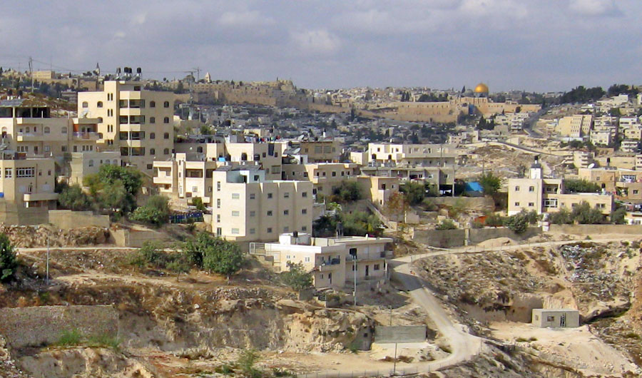 Jabbel mukkabar in Jerusalem